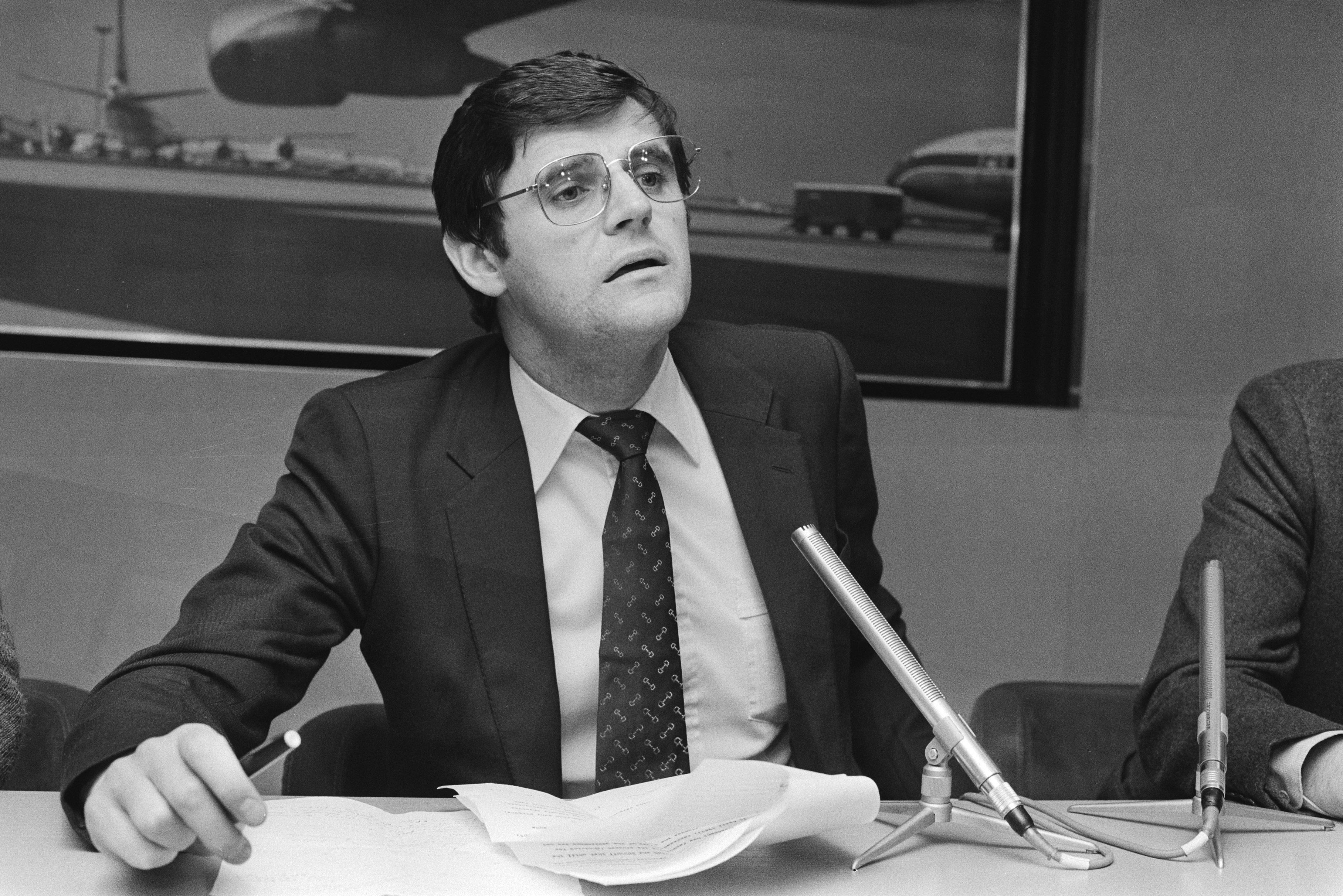 Collectie / Archief : Fotocollectie Anefo Reportage / Serie : Jurist Marc Bossuyt op Schiphol na een onderzoek in Suriname naar de toedracht van de "doden van 8 december" Beschrijving : Marc Bossuyt Datum : 5 maart 1983 Locatie : Noord-Holland, Schiphol Trefwoorden : aankomst en vertrek, juristen, persconferenties Persoonsnaam : Bossuyt, Marc Fotograaf : Bogaerts, Rob / Anefo Auteursrechthebbende : Nationaal Archief Materiaalsoort : Negatief (zwart/wit) Nummer archiefinventaris : bekijk toegang 2.24.01.05 Bestanddeelnummer : 932-5208